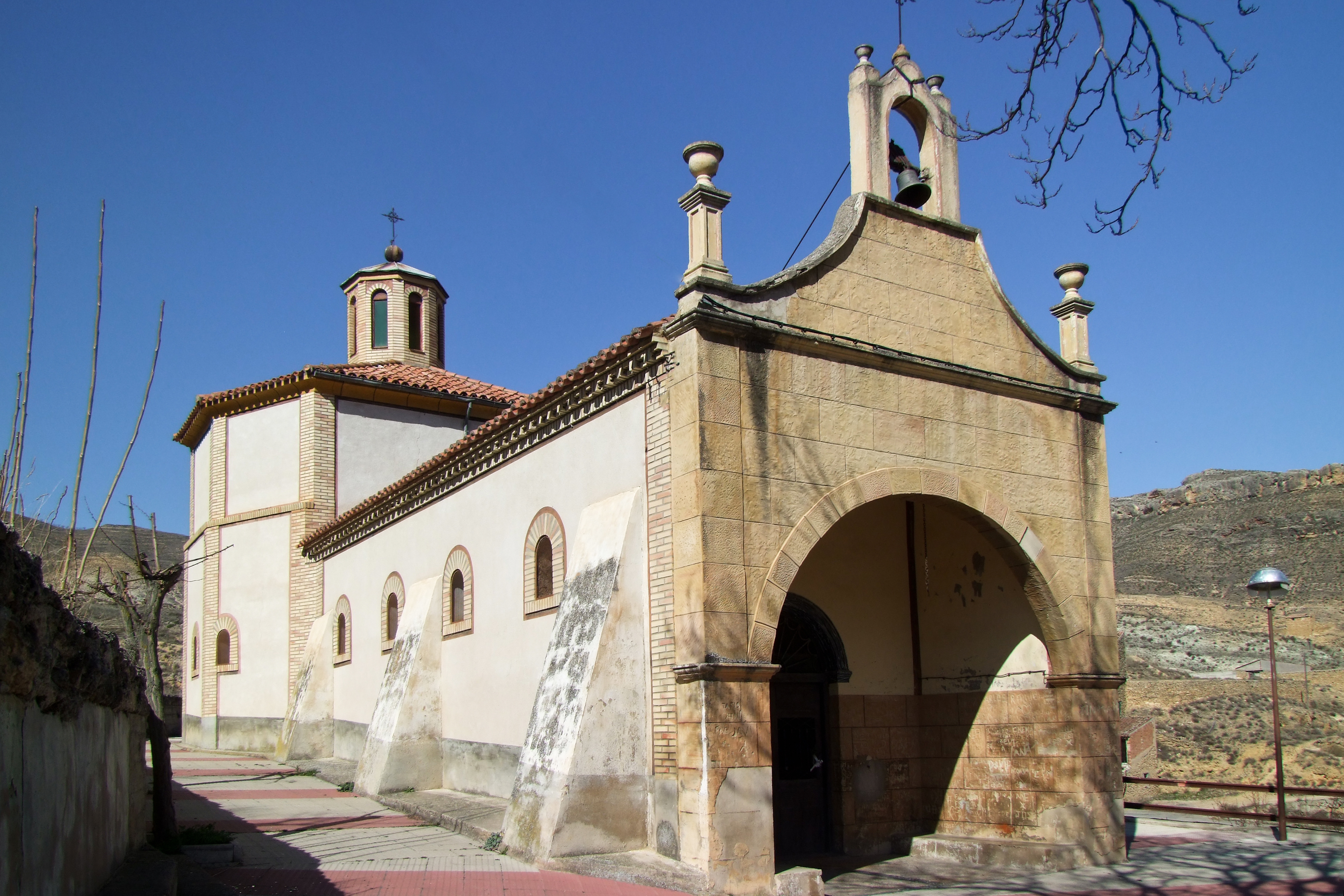 Ermita de la Soledad en la localidad de Cervera del Rio Alhama, La Rioja - España